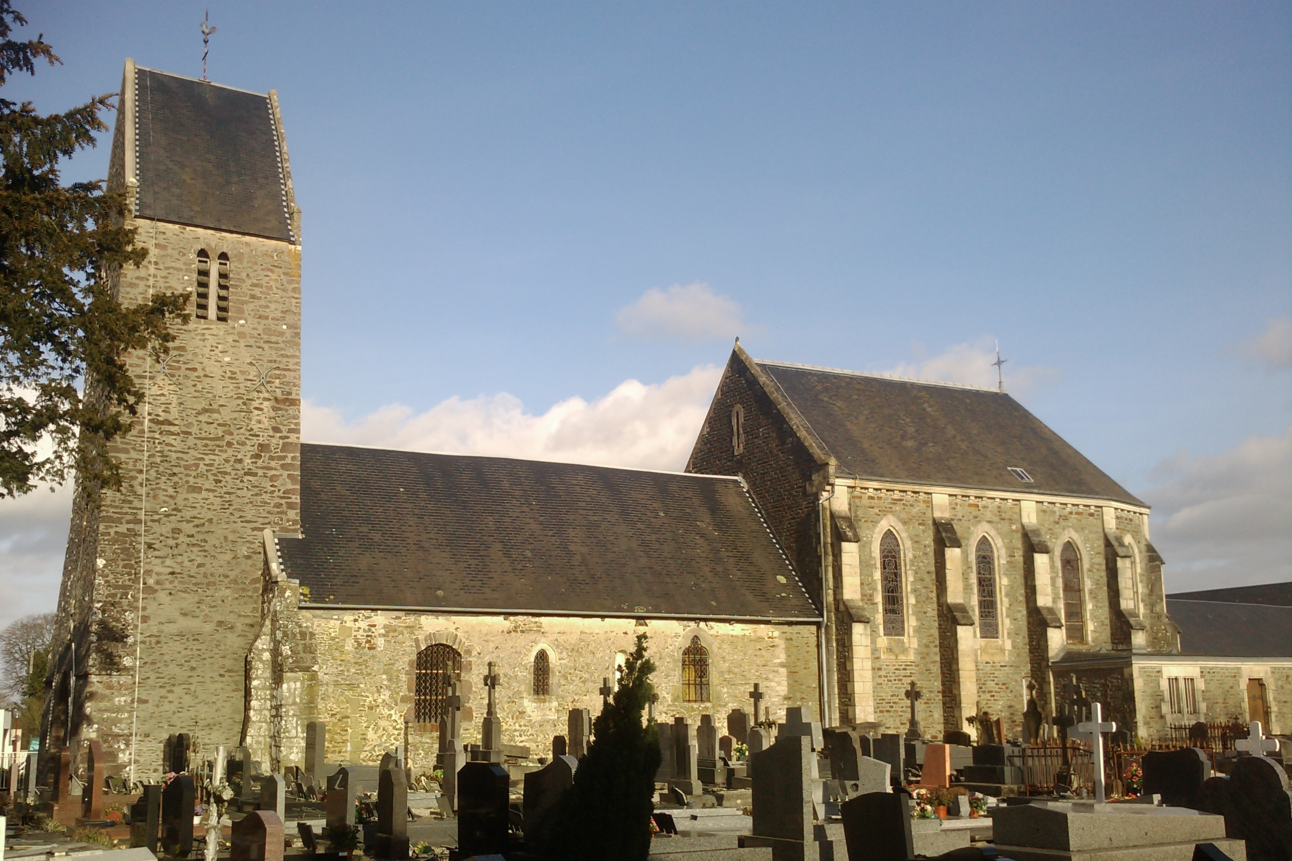 Église de Saint-Samson-de-Bonfossé